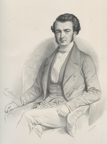 Jules Gallay (1822-1897)